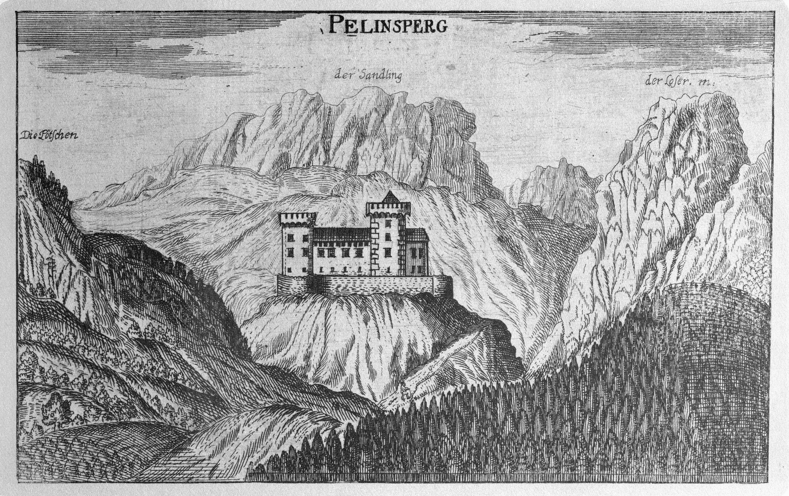 G. M. Vischers Käyserlichen Geographi, Topographia Ducatus Stiriae, Das ist: Eigentliche Delineation / und Abbildung aller Städte / Schlösser / Marcktfleck / Lustgärten / Probsteyen / Stiffter / Clöster und Kirchen / so es sich im Herzogthumb Steyrmarck befinden; Und anjetzo Umb einen billichen Preyß zu finden seynd Bey Johann Bitsch Universitäts Buchhandlern / Auff dem Juden=Platz bey der guldenen Saulen. Graz 1681 Die Nummerierung der Dateien folgt der alphabetischen Reihung der Ortsnamen und entspricht nicht dem Vischer-Register